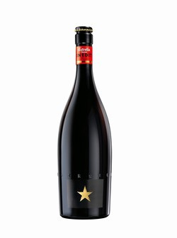 Inedit